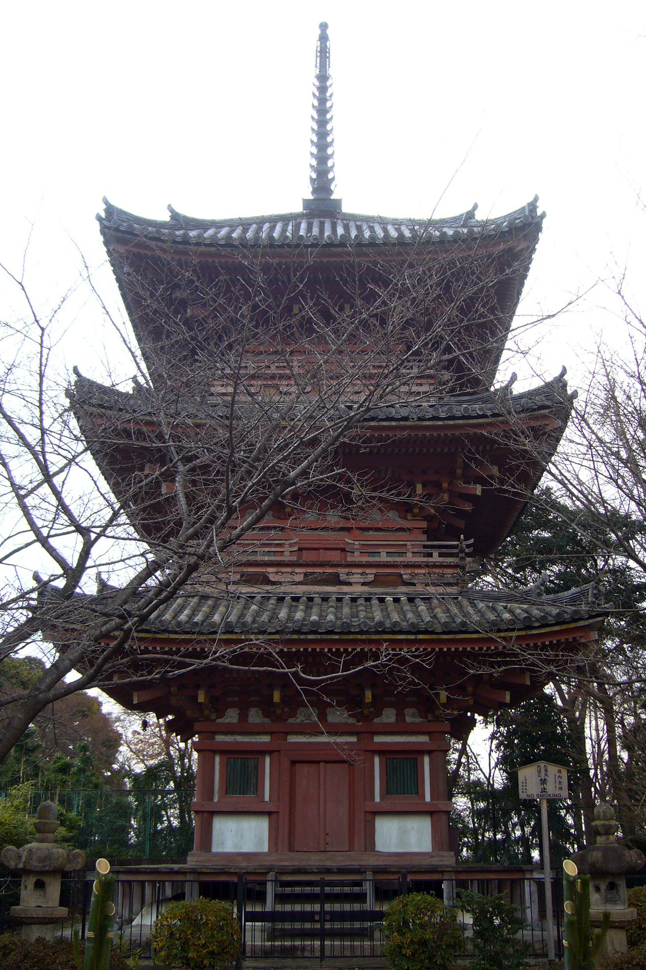 Hoshakuji in Oyamazaki-cho, Kyoto prefecture, Japan